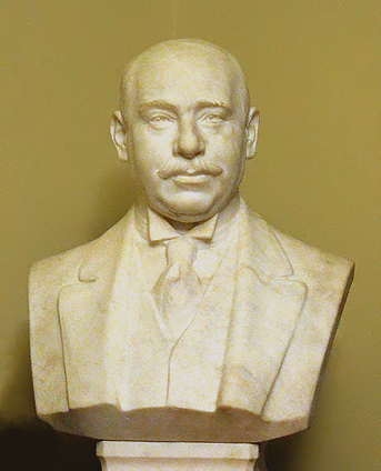 Zur Eröffnung der Ausstellung Israel Alter - der letzte Kantor von Hannover im Rahmen der Herbsttage der Jüdischen Musik in Räumlichkeiten der Villa Seligmann ...